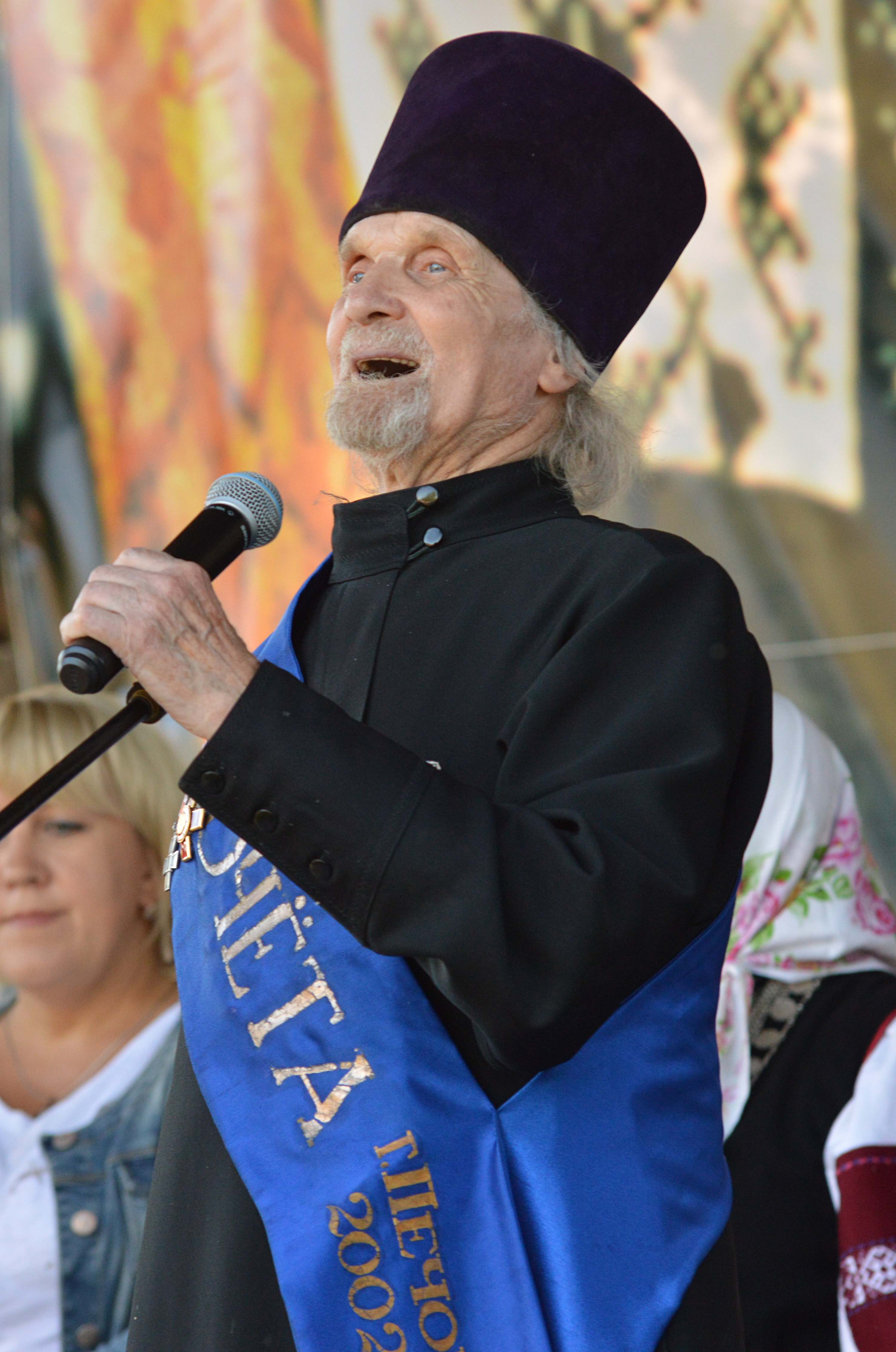 Isa Jevgeni. Seto kultuuri festival Radajal.